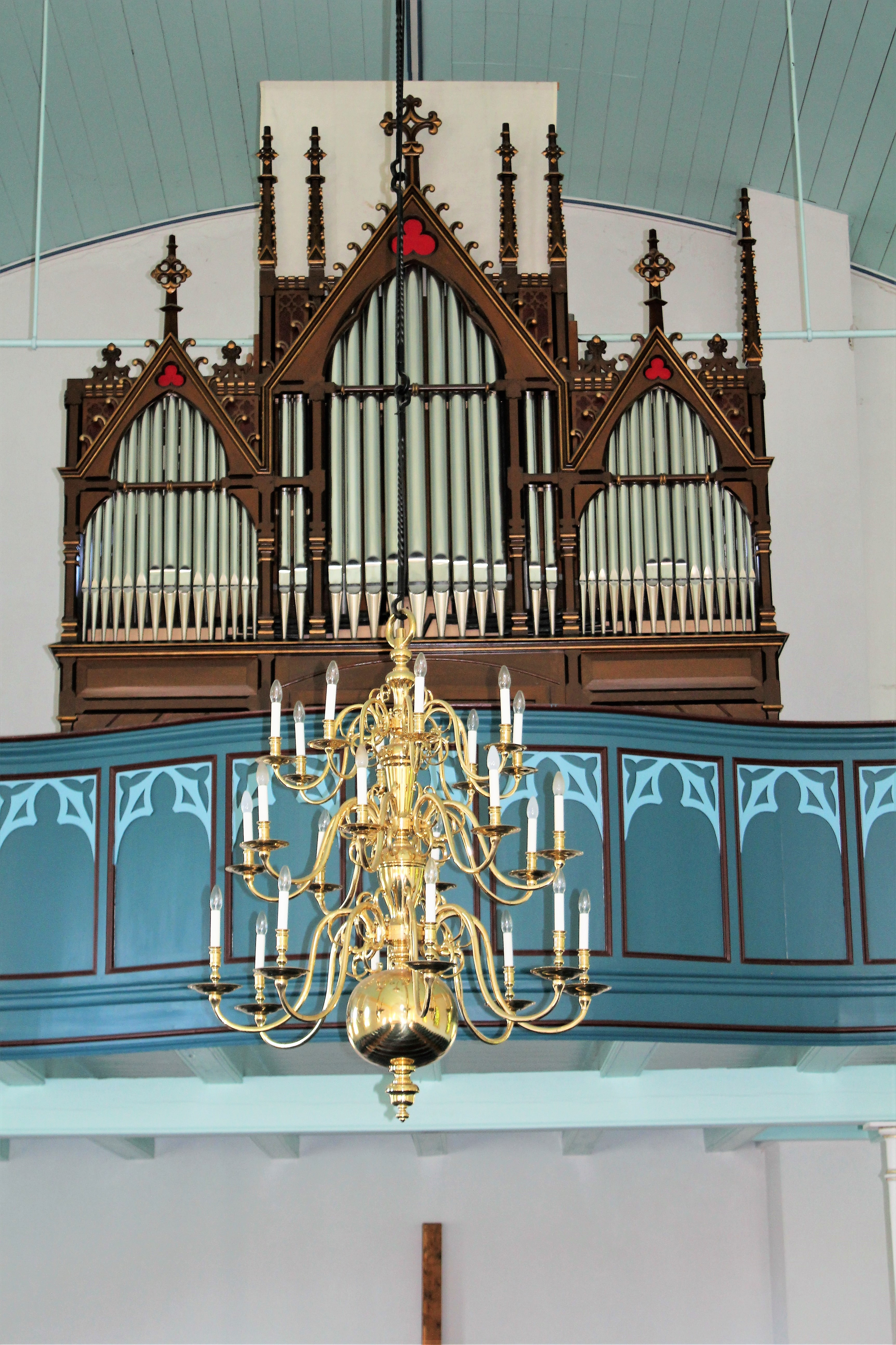 Evangelisch-reformierte Kirche Wymeer, Landkreis Leer, Niedersachsen, Deutschland